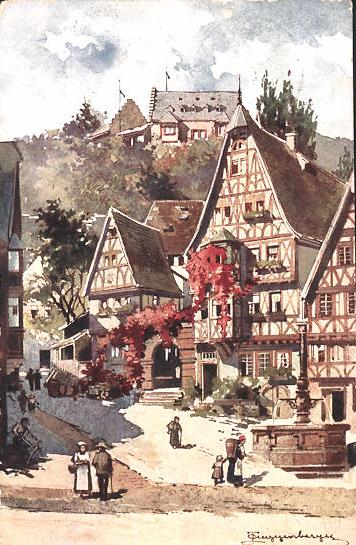 Miltenberg, Marktplatz. Ansichtskarte gelaufen 1909